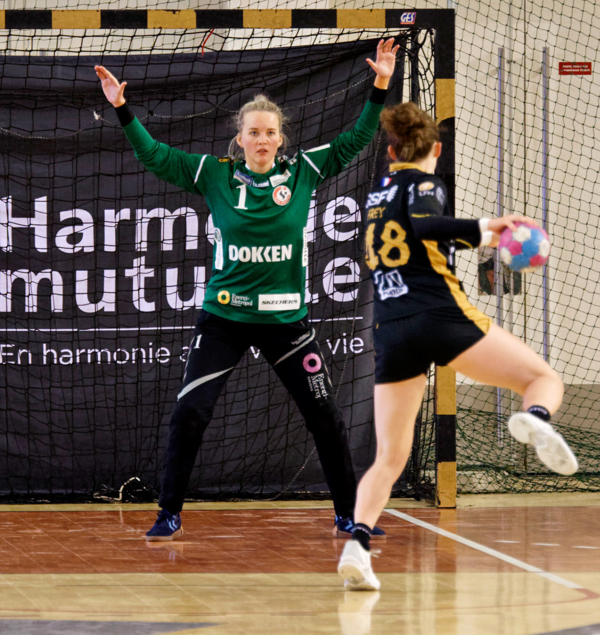 Lors de la rencontre du 3e tour de la Coupe EHF entre Paris 92 et les danoises de Team Esbjerg. A Issy les moulineaux, le 18 novembre 2018.